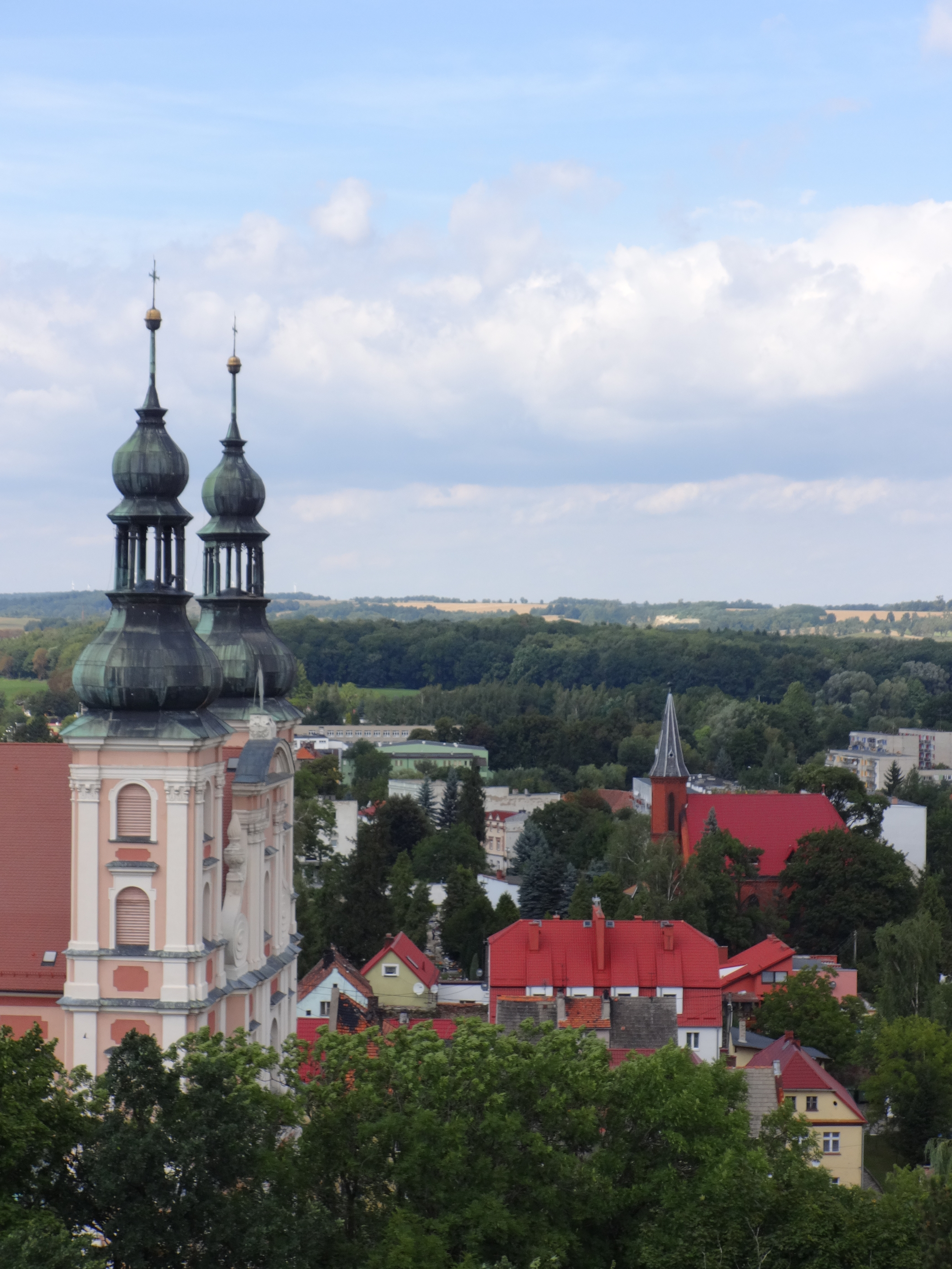 Otmuchów, kościół par. p.w. śś. Mikołaja i Franciszka Ksawerego, 1690-1701